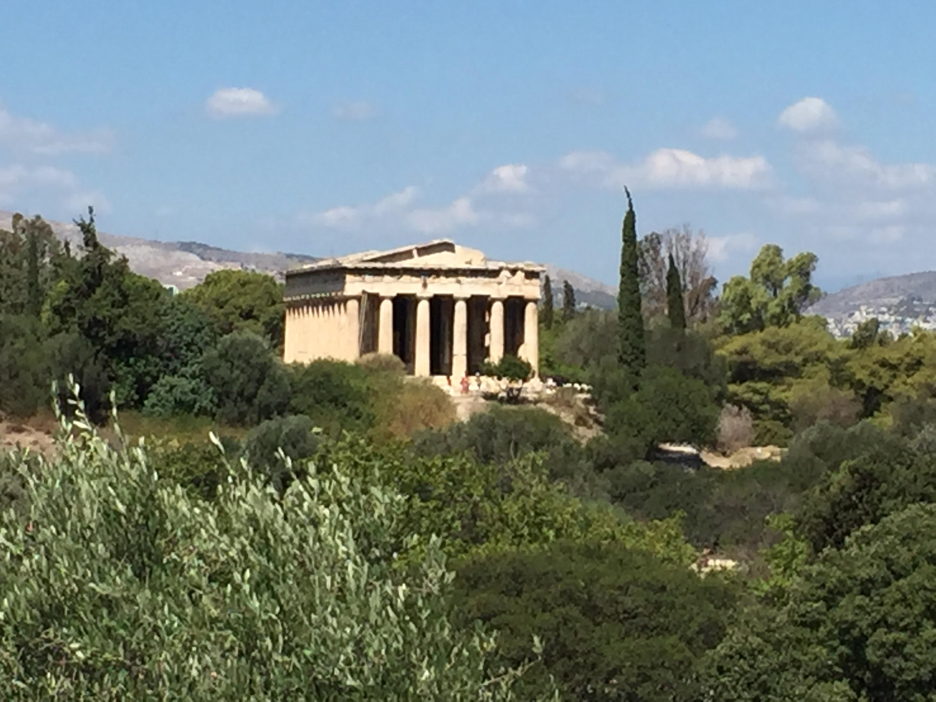 «άγνωστο»